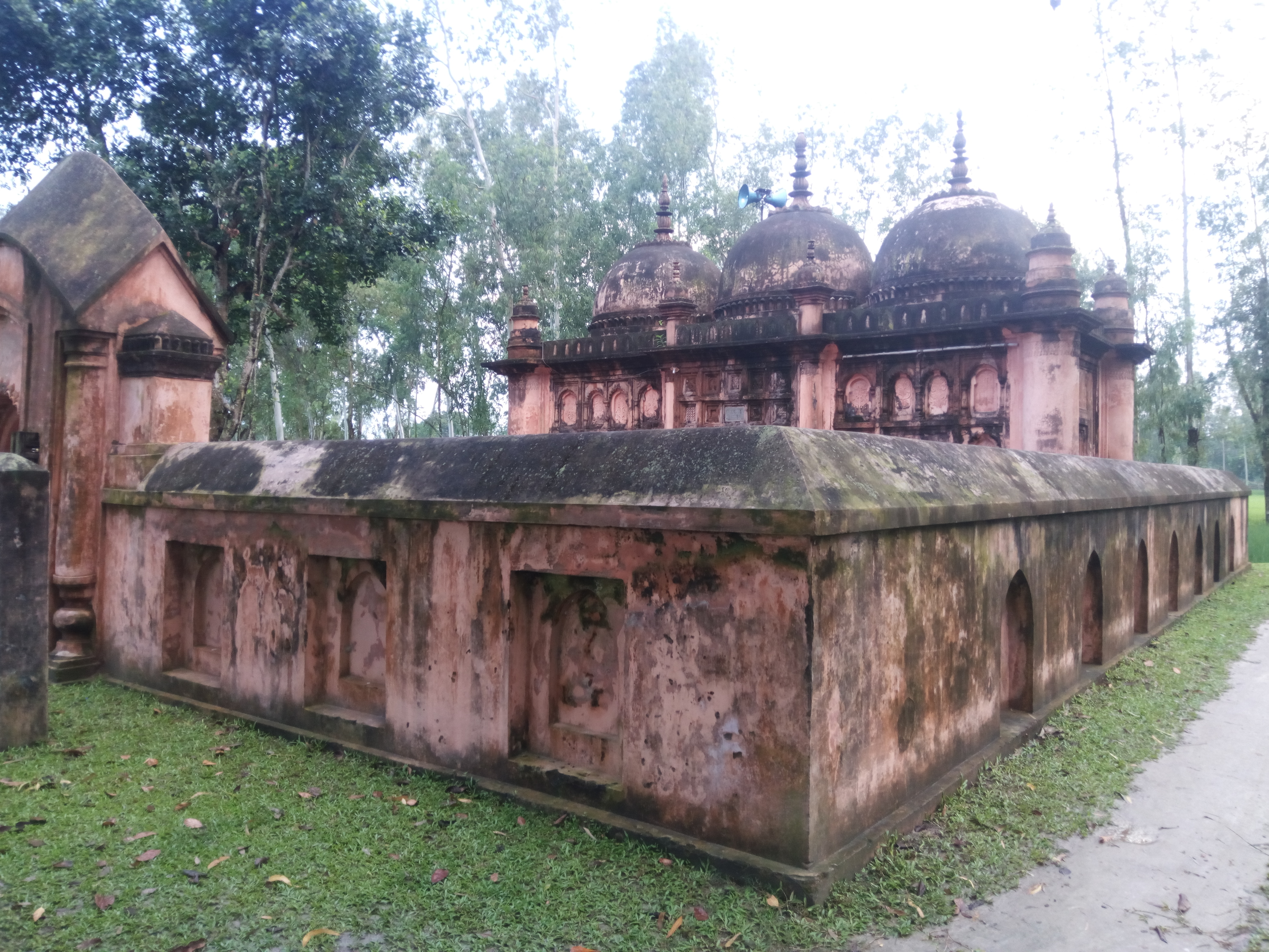 মিঠাপুকুর বড় মসজিদ